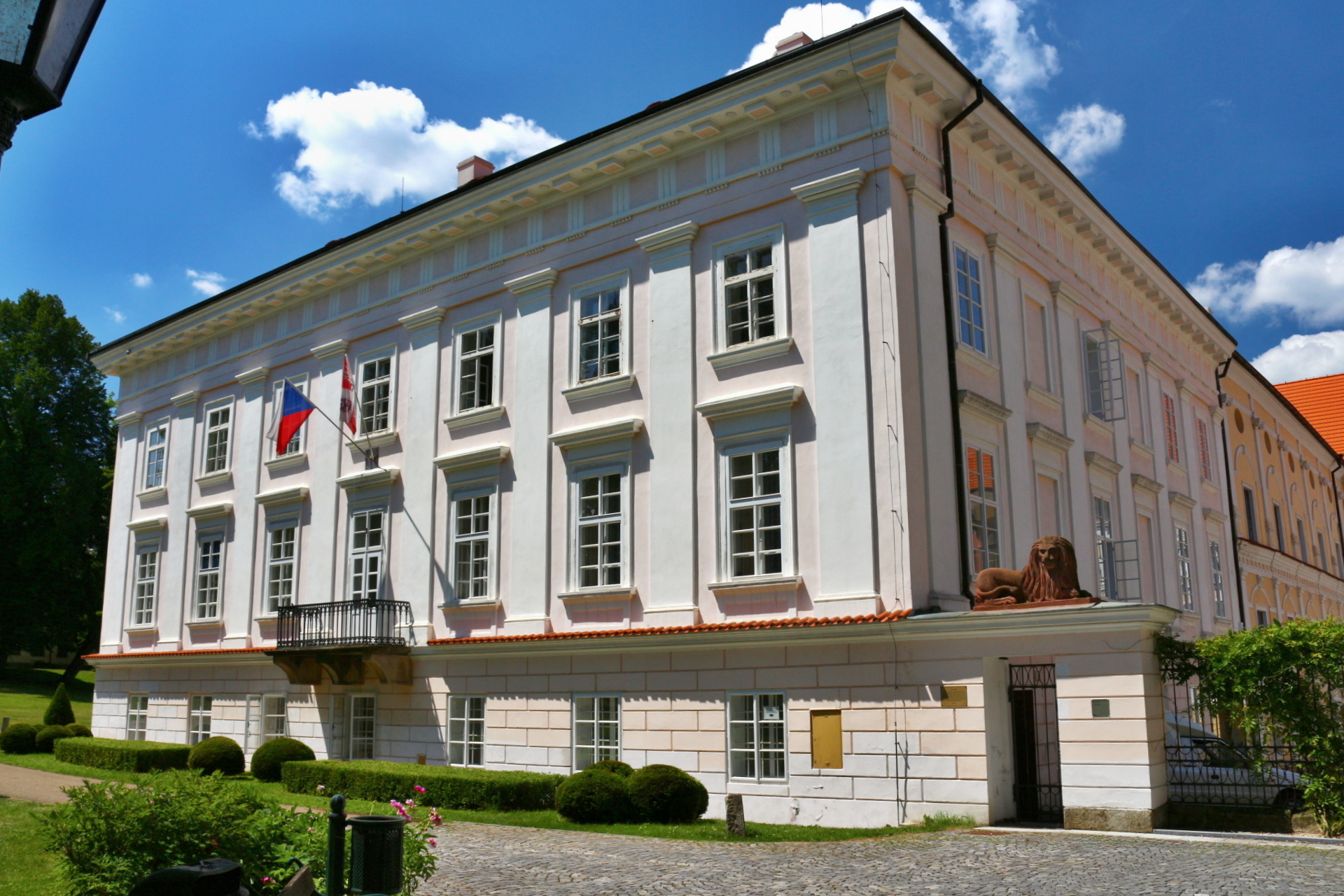 Vlašim